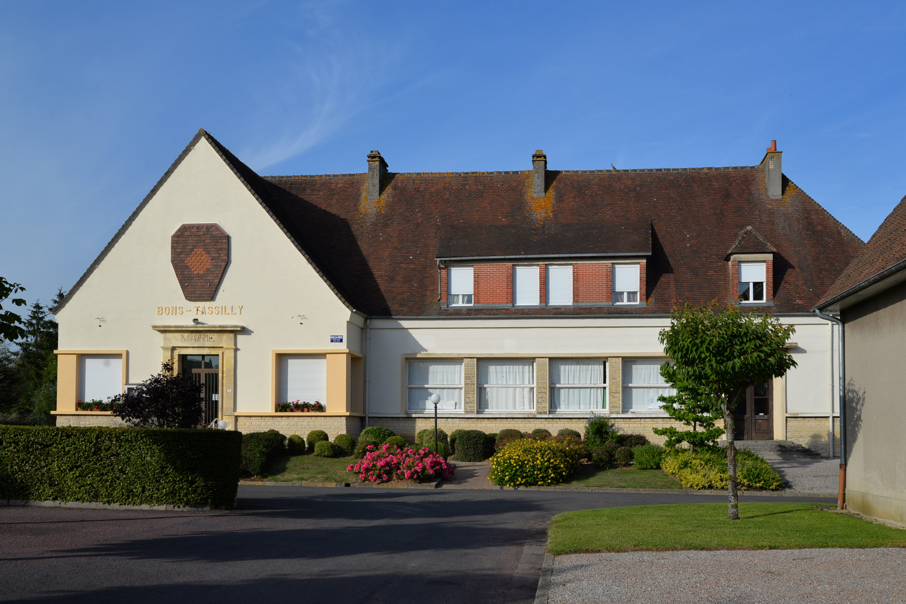 Bons-Tassilly (Calvados)